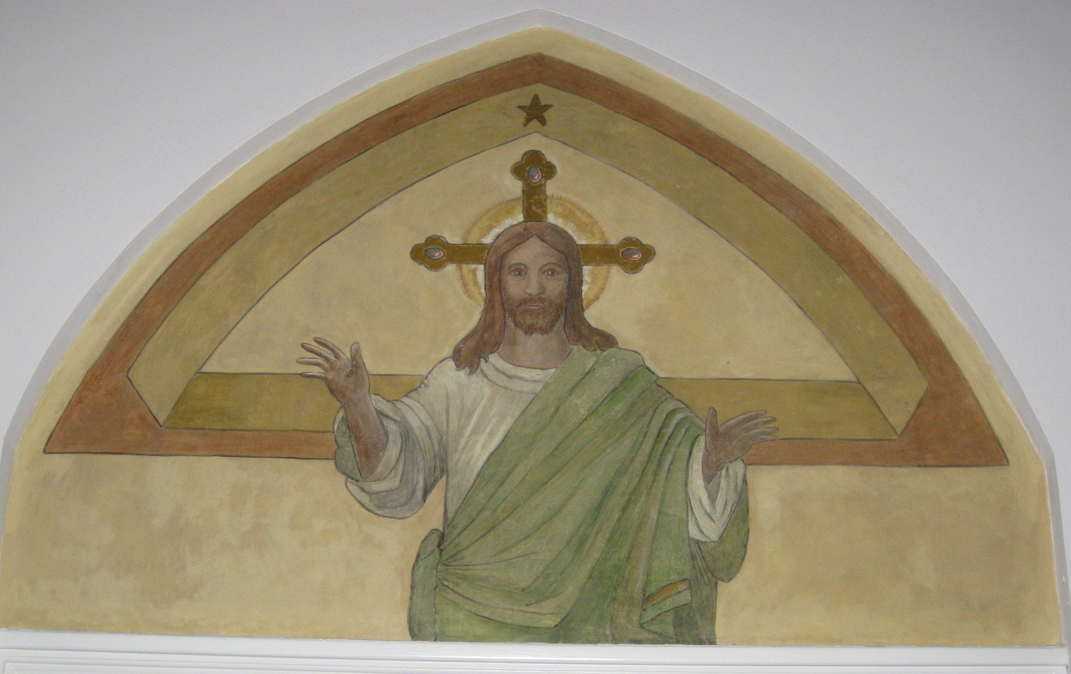 Christusmalerei aus der Bauzeit der Gustaf-Adolfskyrkan in Hamburg, entstanden in der Bauzeit der Kirche (Einweihung 1907)